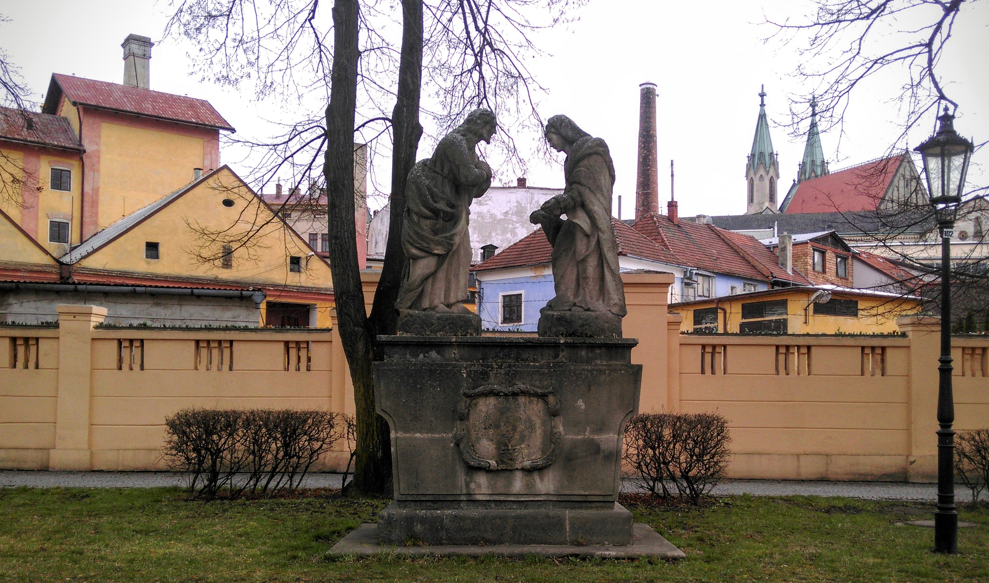 Sousoší Krista s Pannou Marií od Jeana Baptista Dusarta, Chobot, Kroměříž.